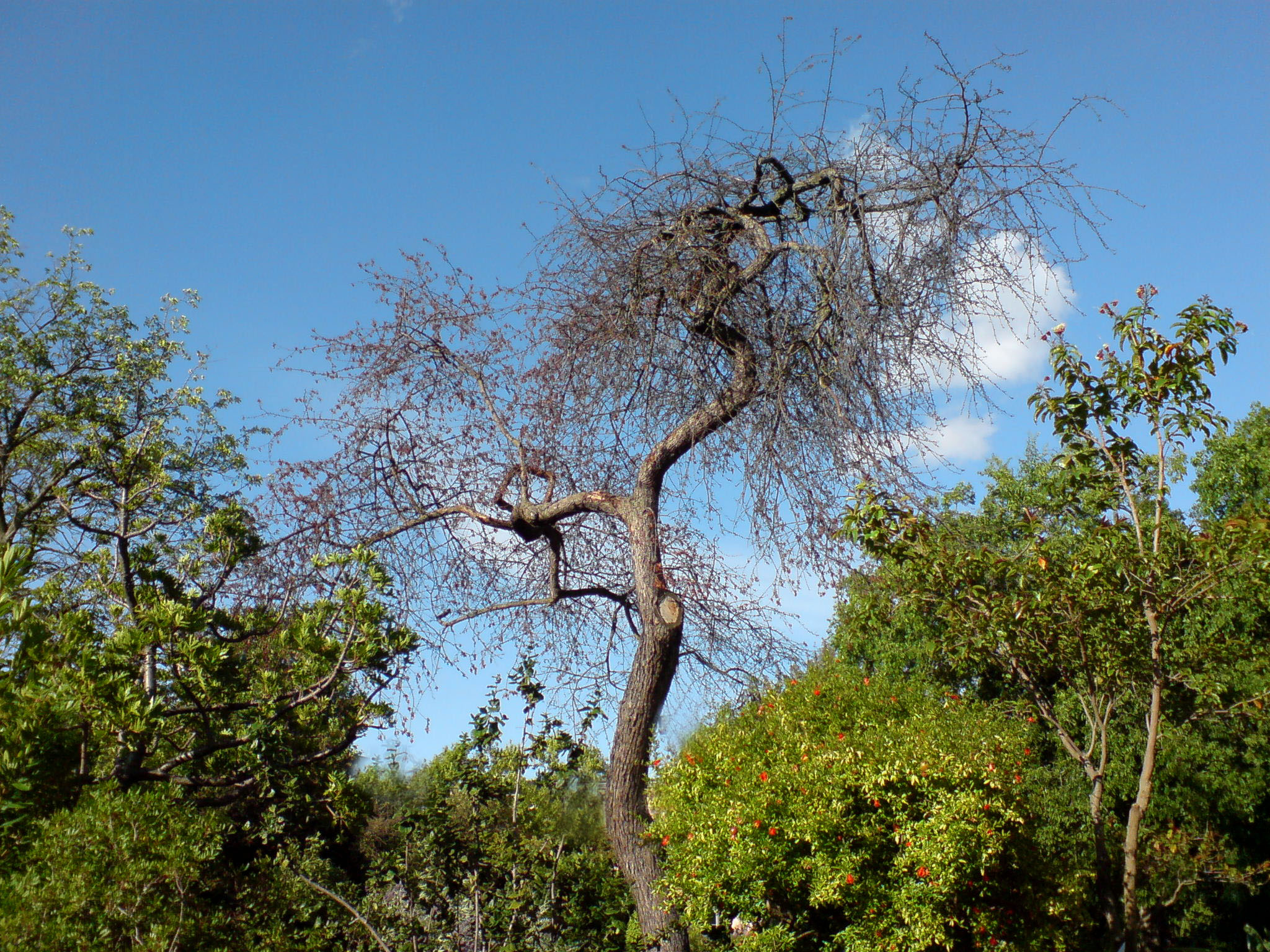 Malus baccata - Botanischer Garten Leipzig